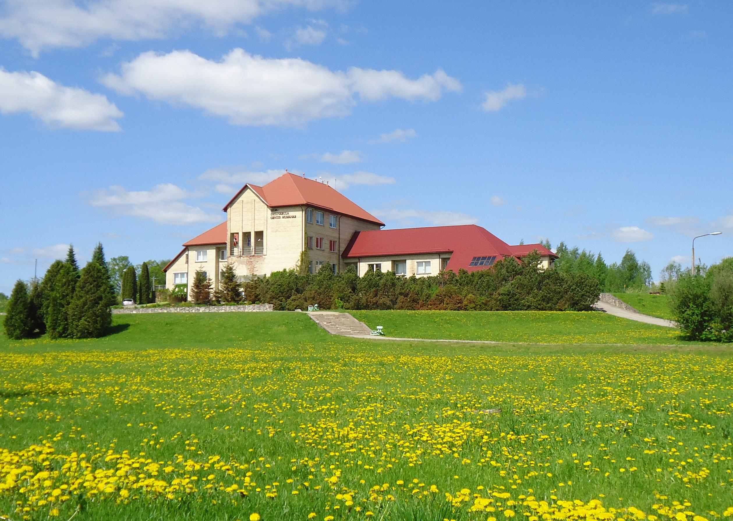 Kalsnavas pagasta pārvaldes ēka